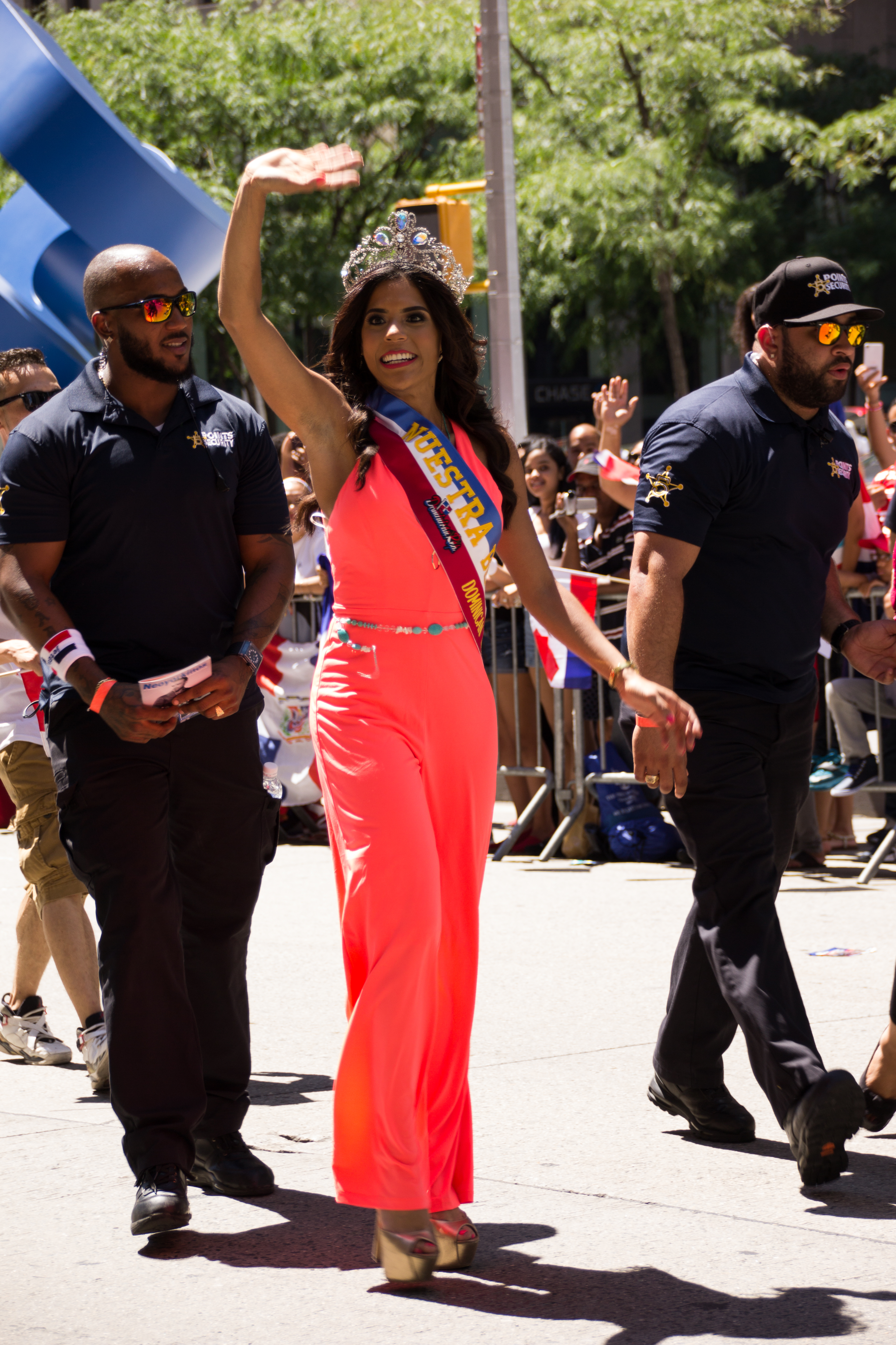 dominican parade 2015